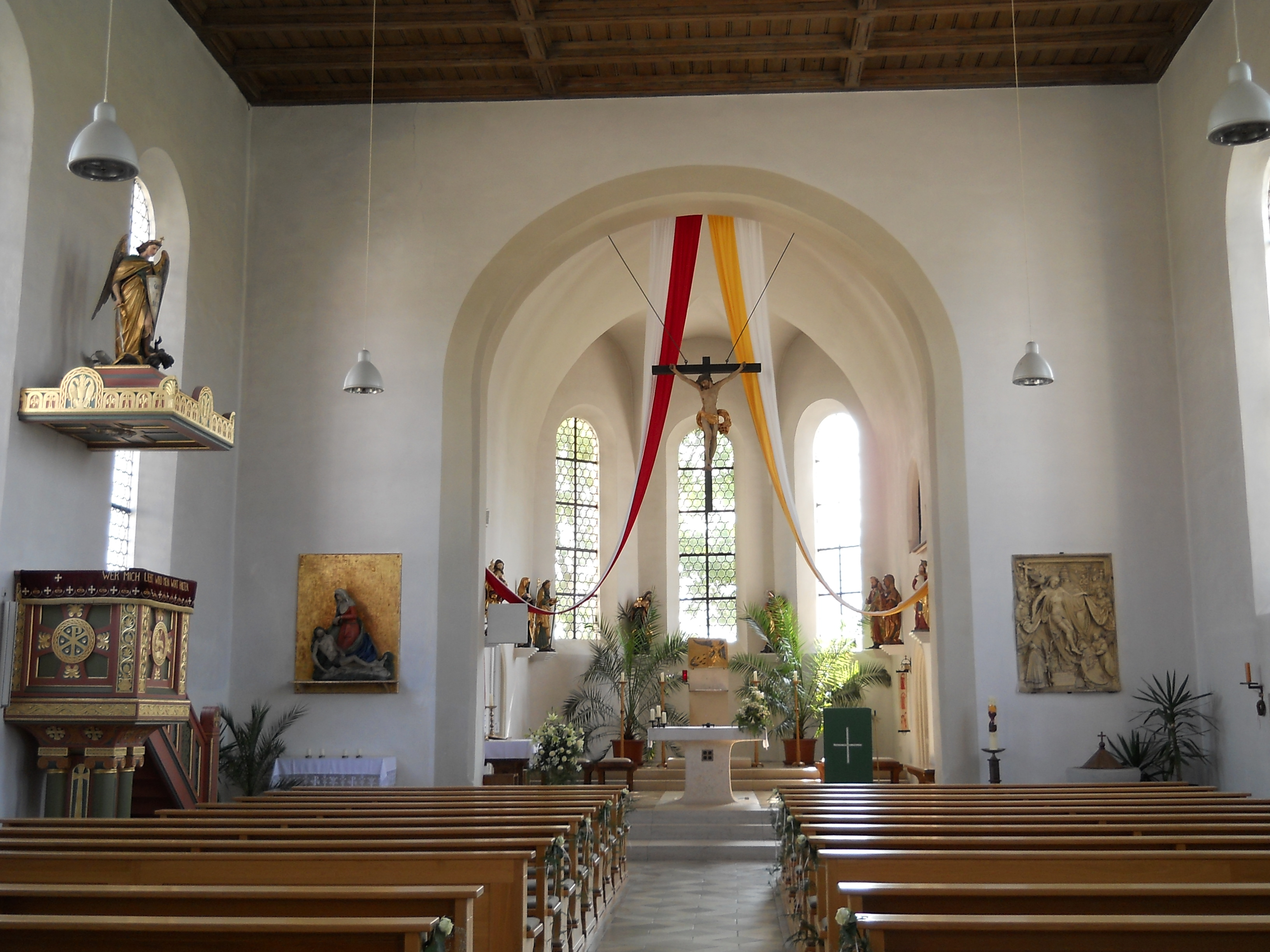 In der Kirche von Rupertsbuch, Gemeindeteil von Schernfeld im oberbayerischen Landkreis Eichstätt